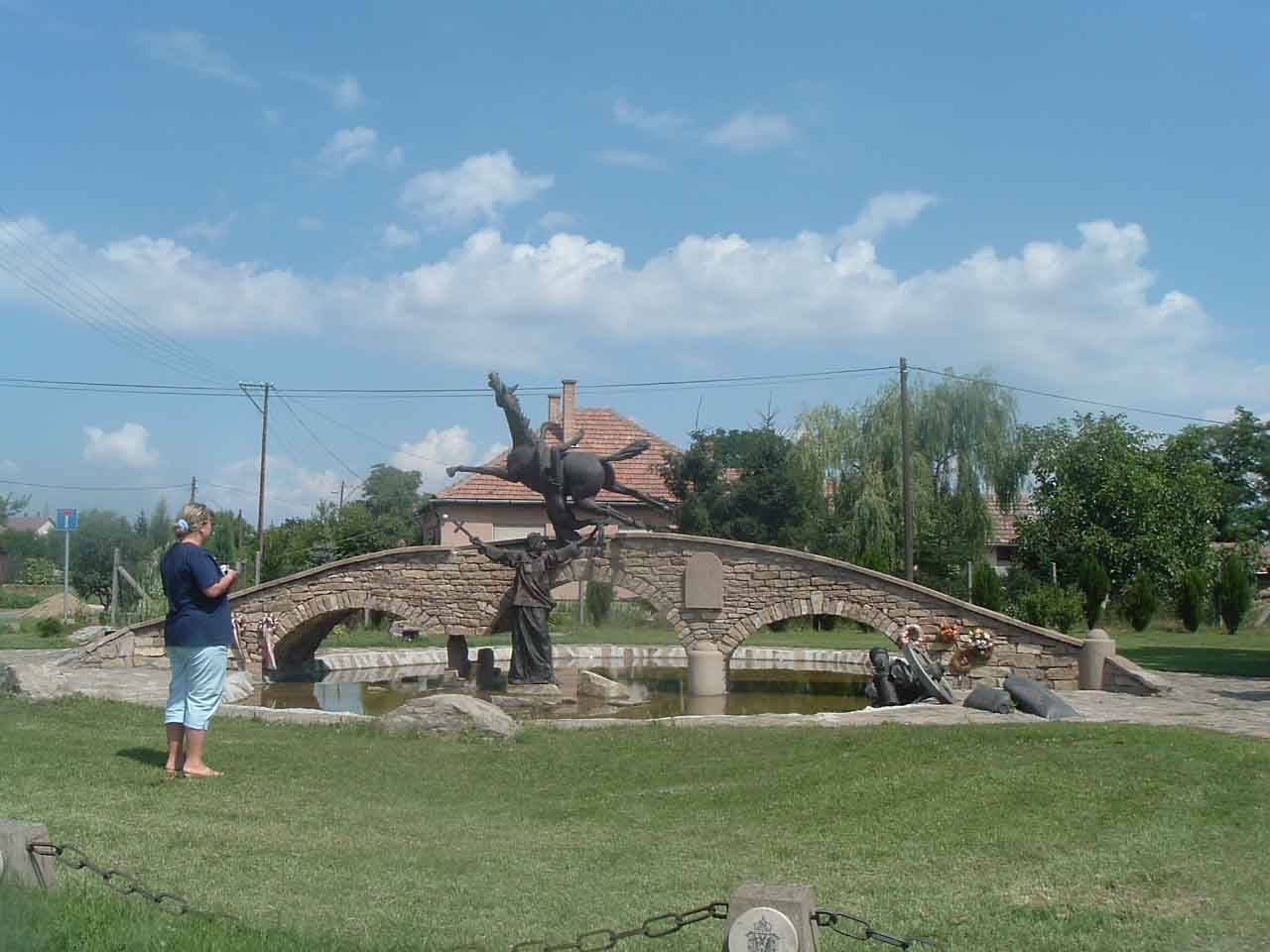 A kápolnai csata emlékműve a Heves megyei Kápolna településen